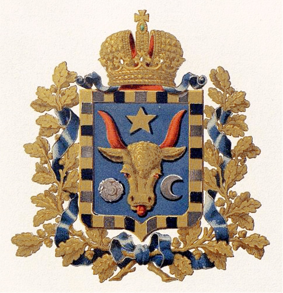 Official Russian Empire coat of arms Bessarabia Governorate. Герб Российской Империи Бессарабской губернии в Гербовнике Министерства внутренних дел Российской Империи 1880 года. Утверждён Императором Всероссийским Александром Вторым.